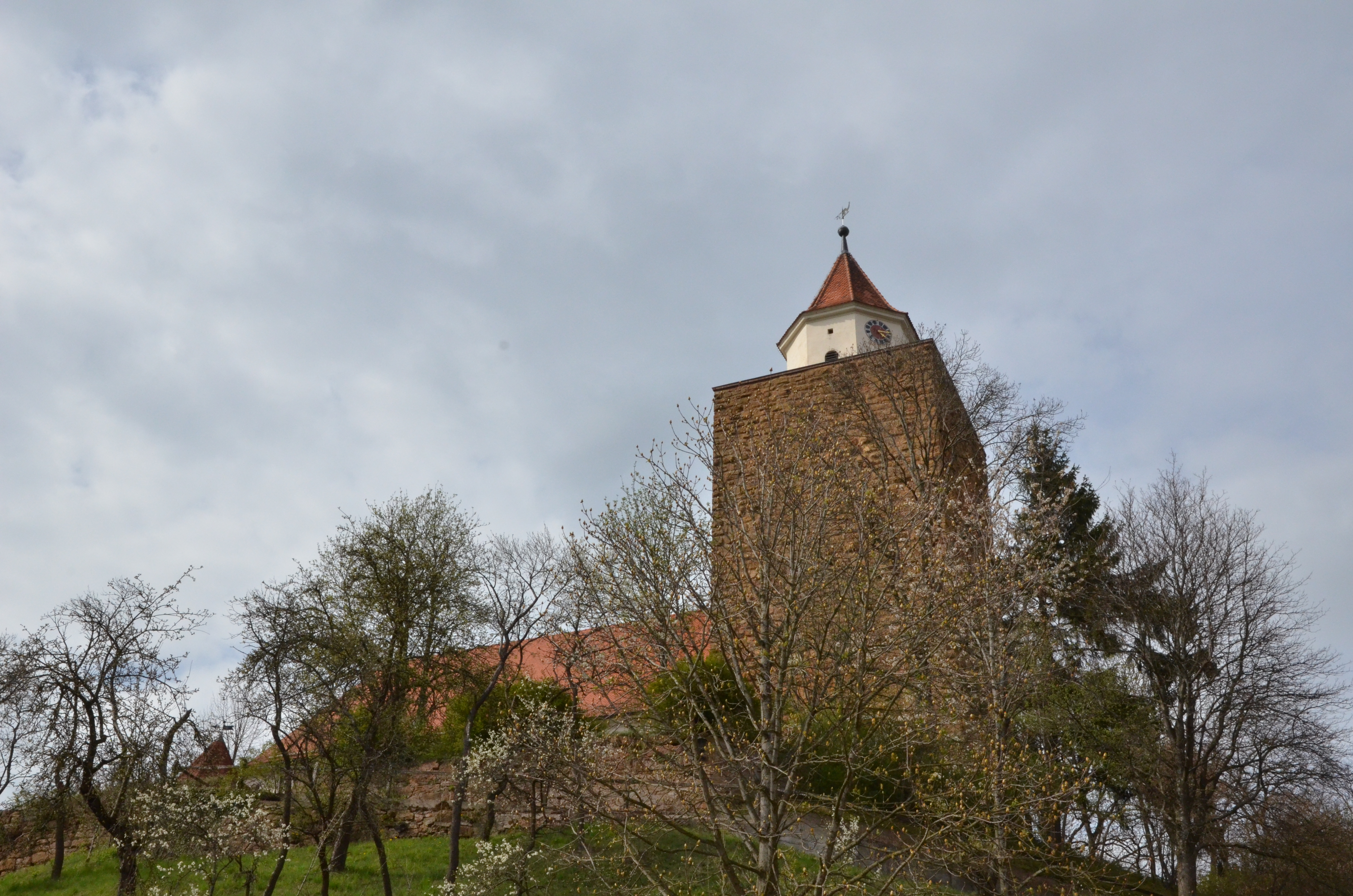 evang.-luth. Kirche St. Johannes der Täufer in Hohentrüdingen